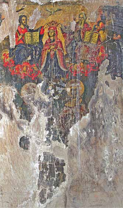 „Светата Троица коронясва Богородица“, по-долу, в долния дял на иконата са фигурите на Константин и Елена с Чесният кръст между тях. Икона на Дичо Зограф от църквата „Свети Никола“, Сенце, Реканско.